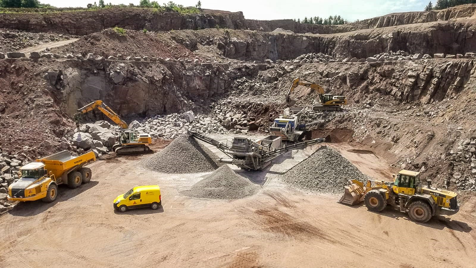 Carrière de granit rouge corail à Vieux-Moulin, commune du canton de Senones (Vosges).